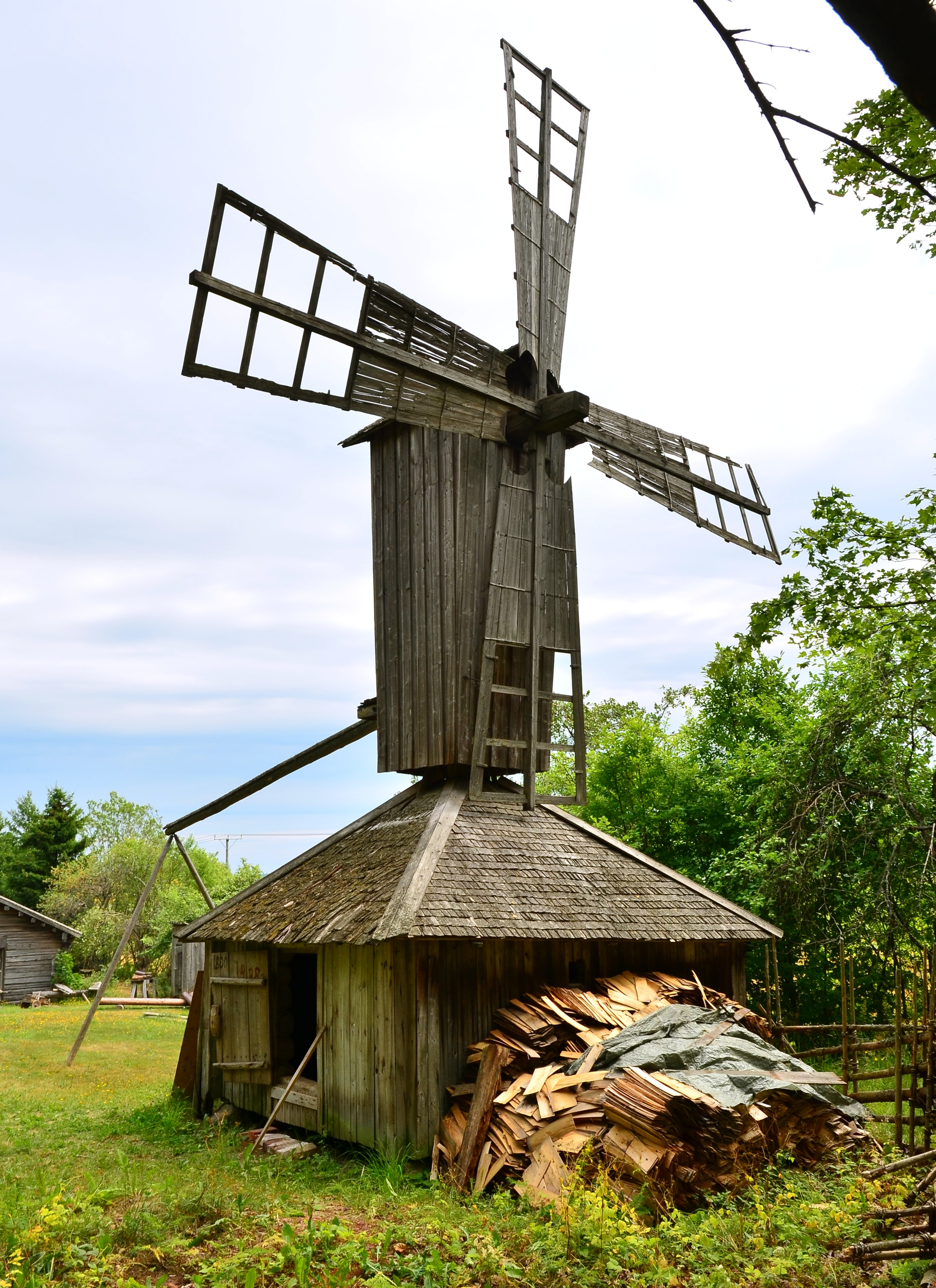 En väderkvarn från Engelsby Kullas, flyttad till Sagalund 1911. Kvarnen är en så kallad "harack-kvarn" där det övre kvarnhuset med vingar och kugghjul kan virdas medan det undre kvarnhuset med kvarnstenarna står fast.